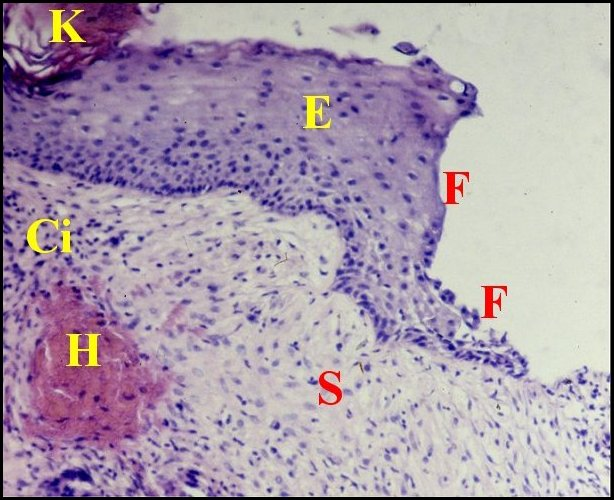 Front de l'épithélium du cholestéatome sur stroma non inflammatoire